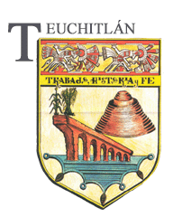 Escudo del Municipio de Teuchitlan